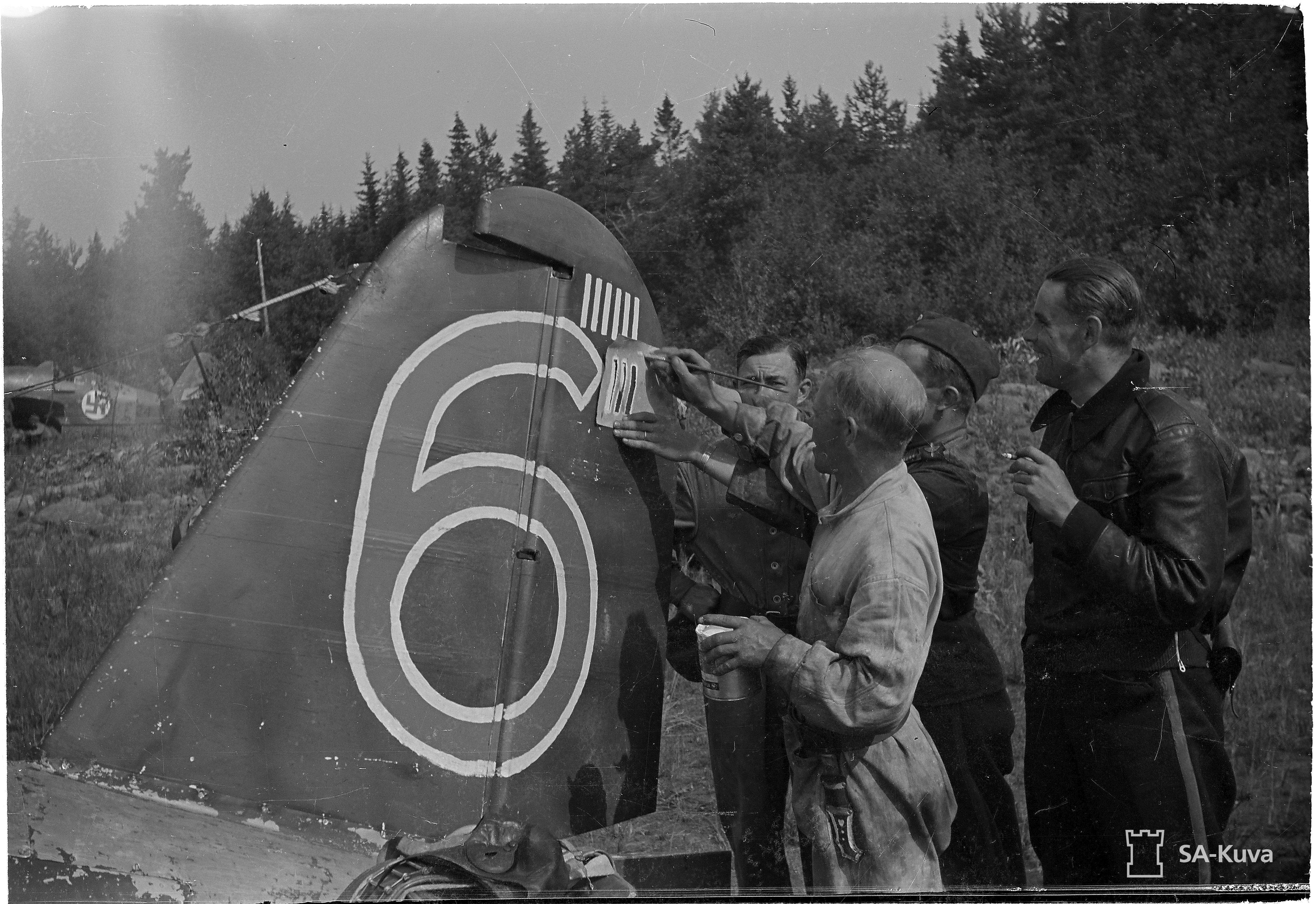 Lentomestari Oiva Tuomisen koneeseen maalataan 7 ja 8 voittoviiru 30.7.1941